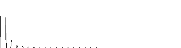 Frequenzanalyse des Nutzsignals